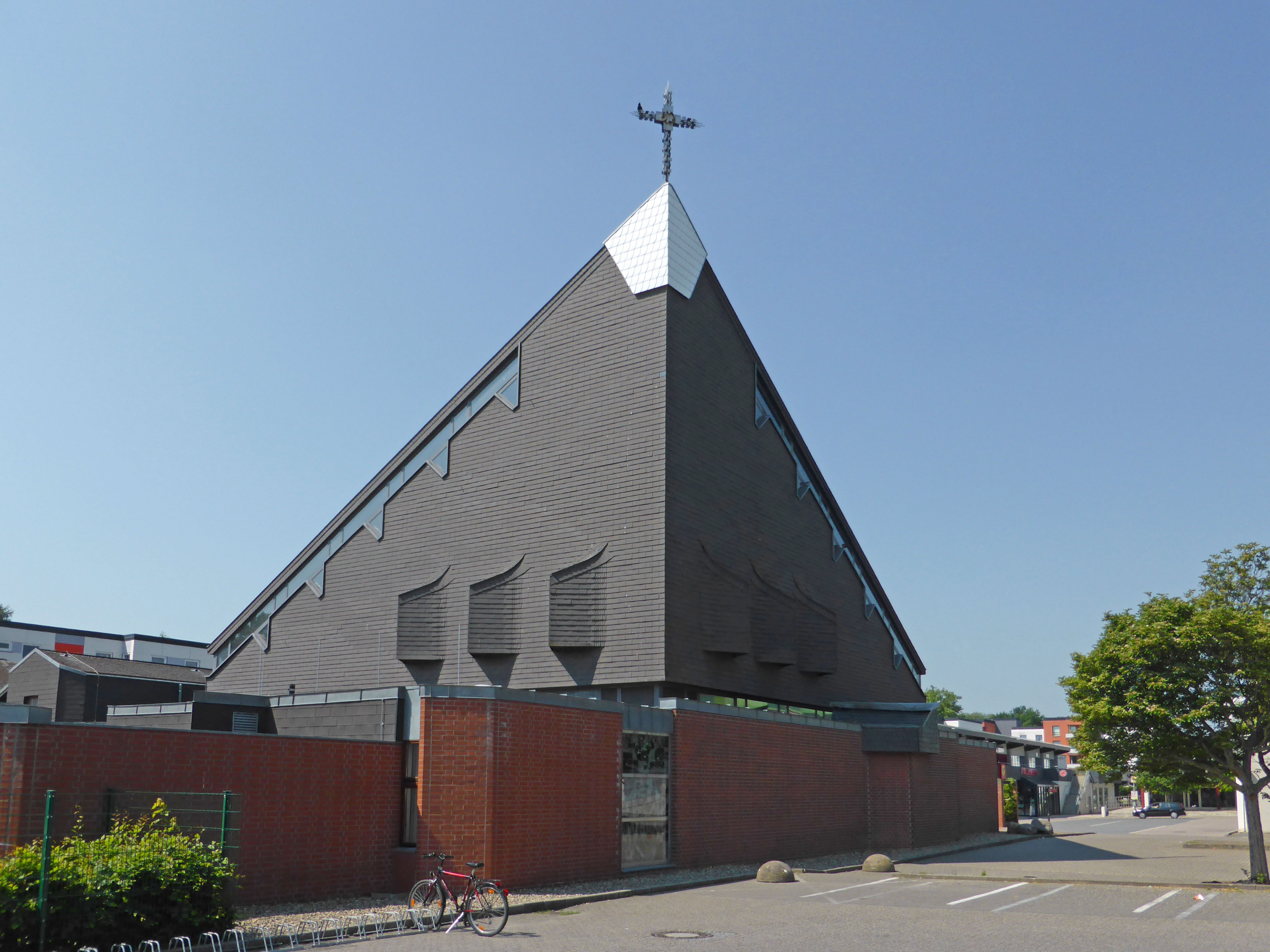 St.-Maximilian-Kolbe-Kirche in Salzgitter-Fredenberg.